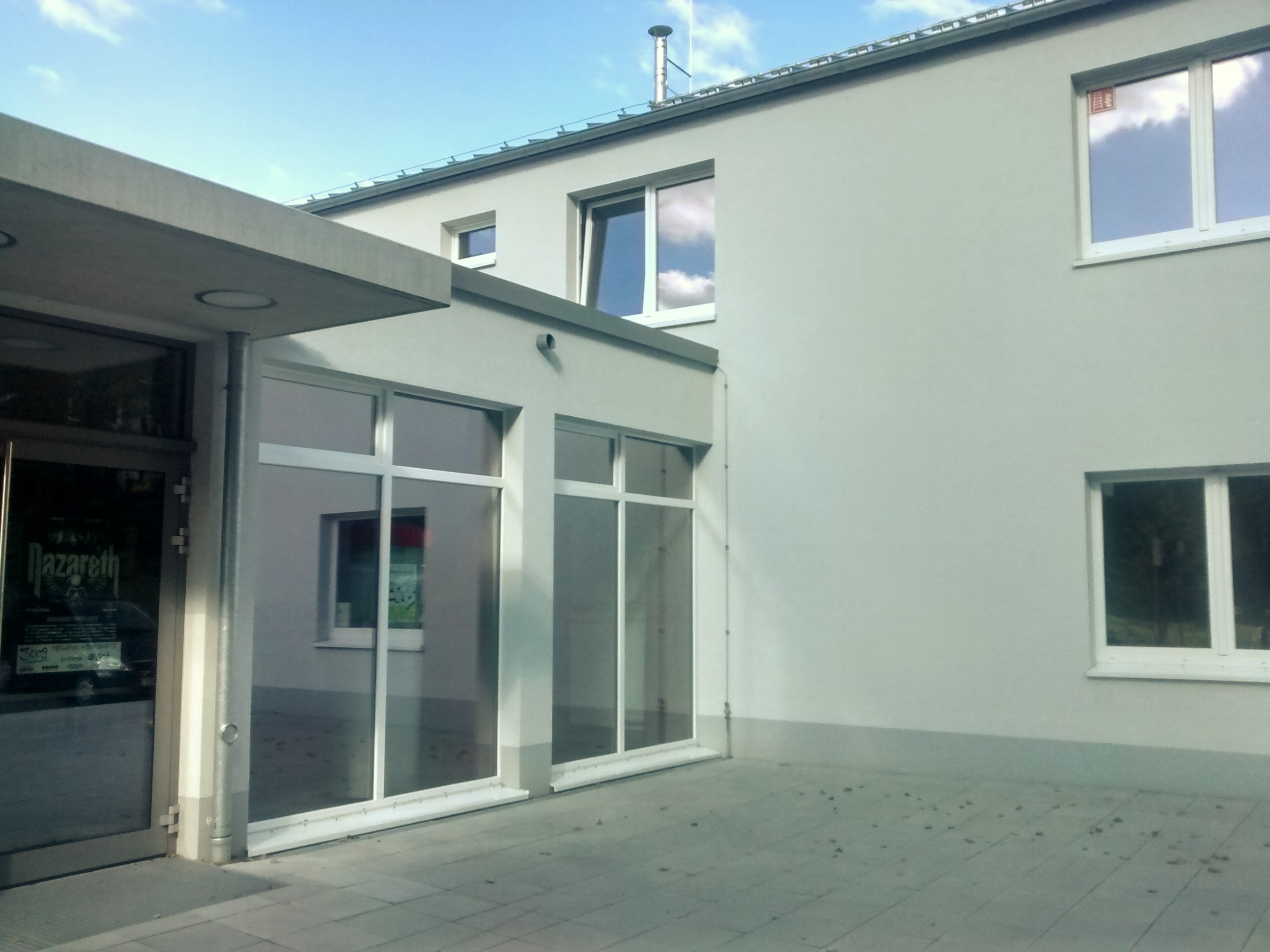 Kulturzentrum Megafon Burscheid